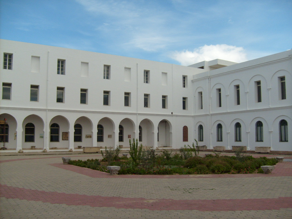 Cour intérieure du Musée national de Carthage (Tunisie)